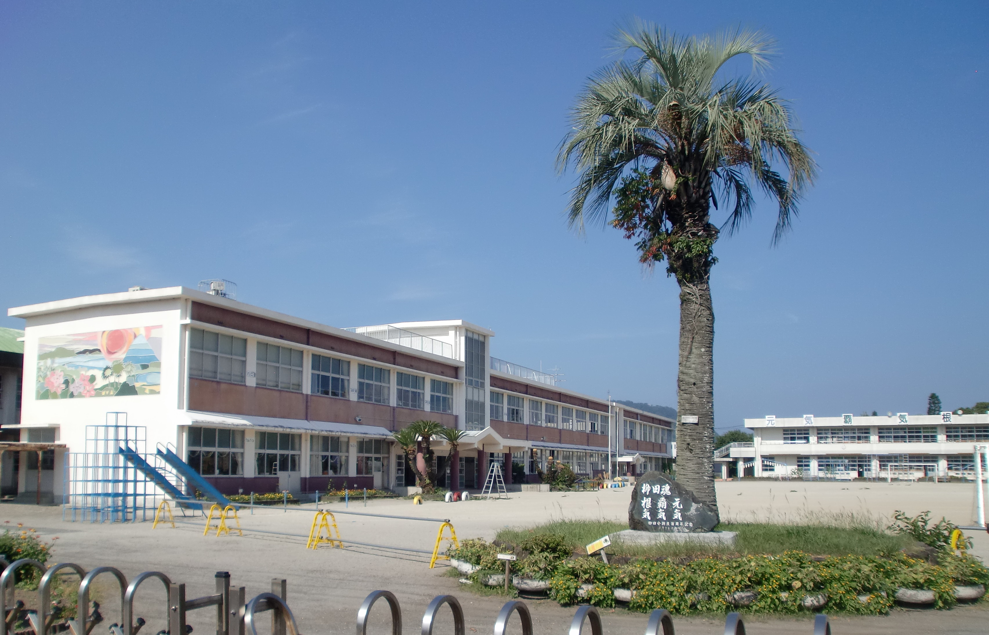 指宿市立柳田小学校の校門から見た外観。